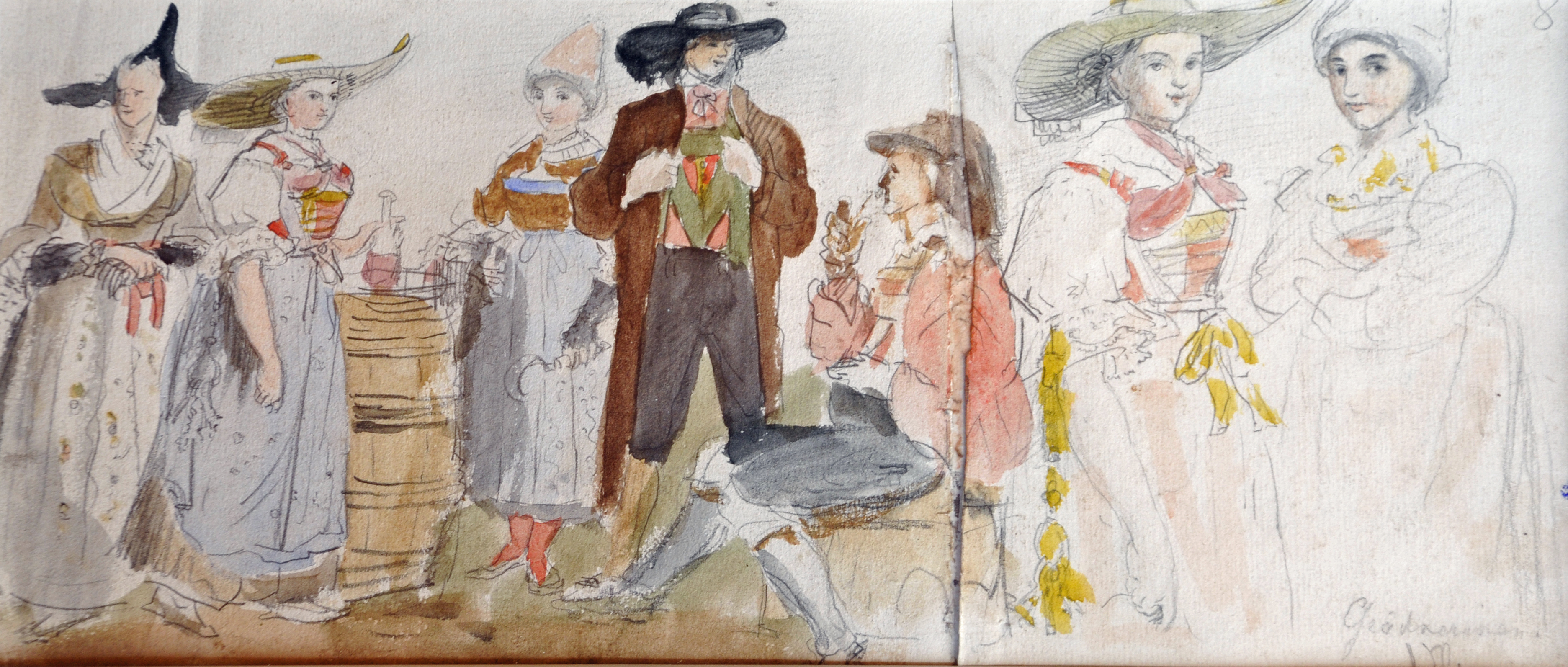 Costumes in Gröden